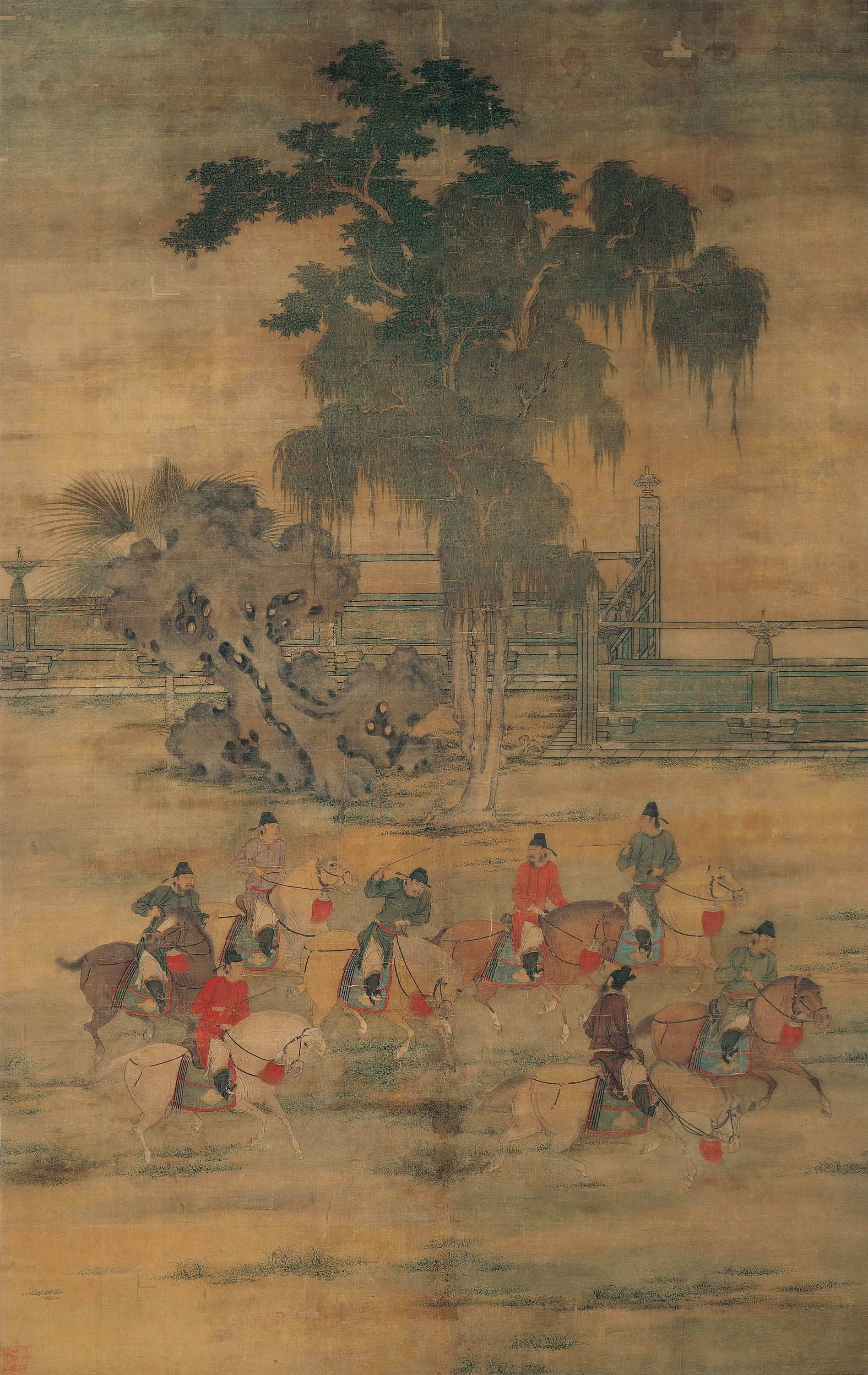 Huit cavaliers au printemps par Zhao Yan, peintre chinois du Xe siècle, attribution. Rouleau mural, encre et couleur sur soie au Xe siècle. (161,9x102cm). Musée national du palais impérial, Taipei.